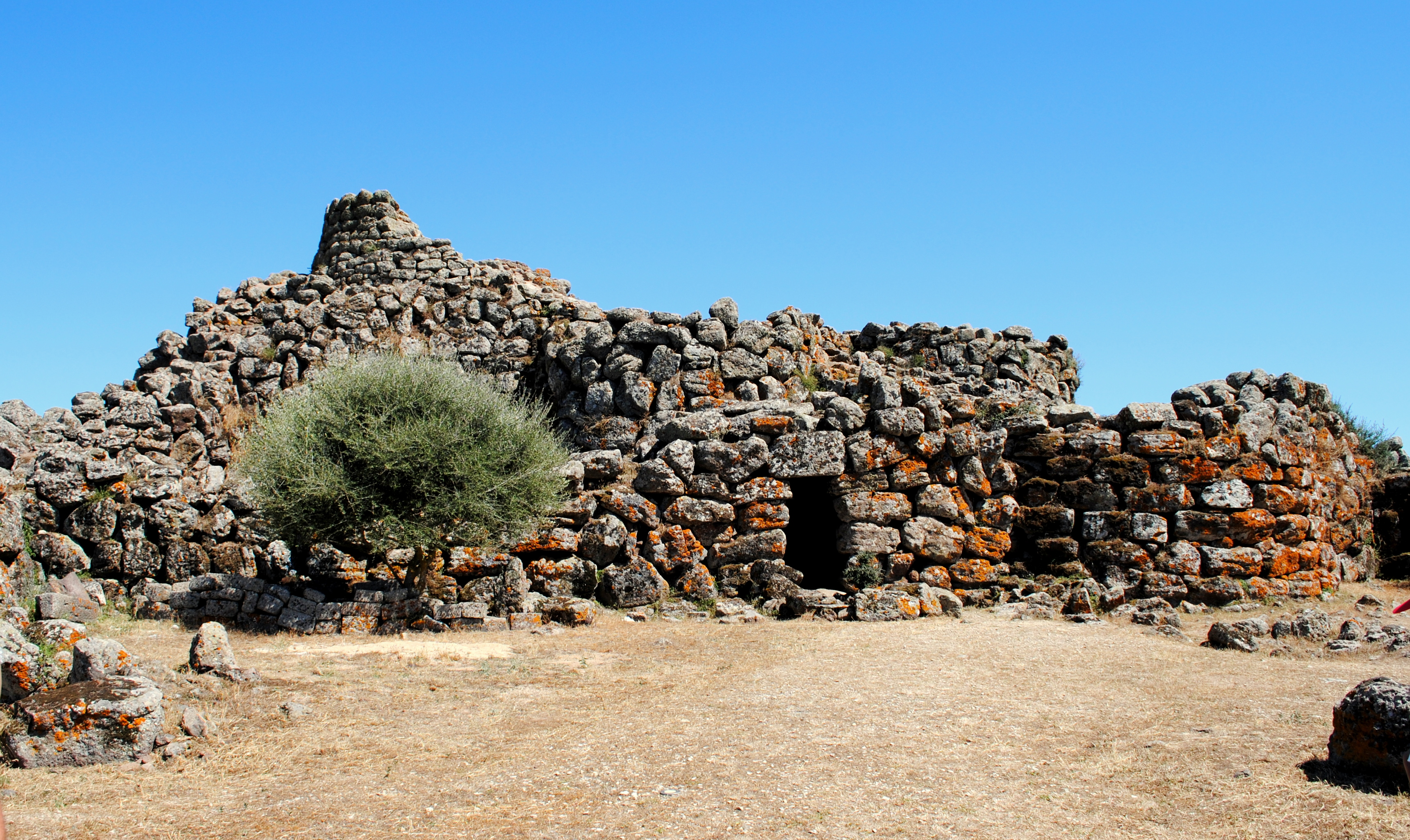 Nuraghe Arrubiu comune di Orroli (CA) This is a photo of a monument which is part of cultural heritage of Italy.